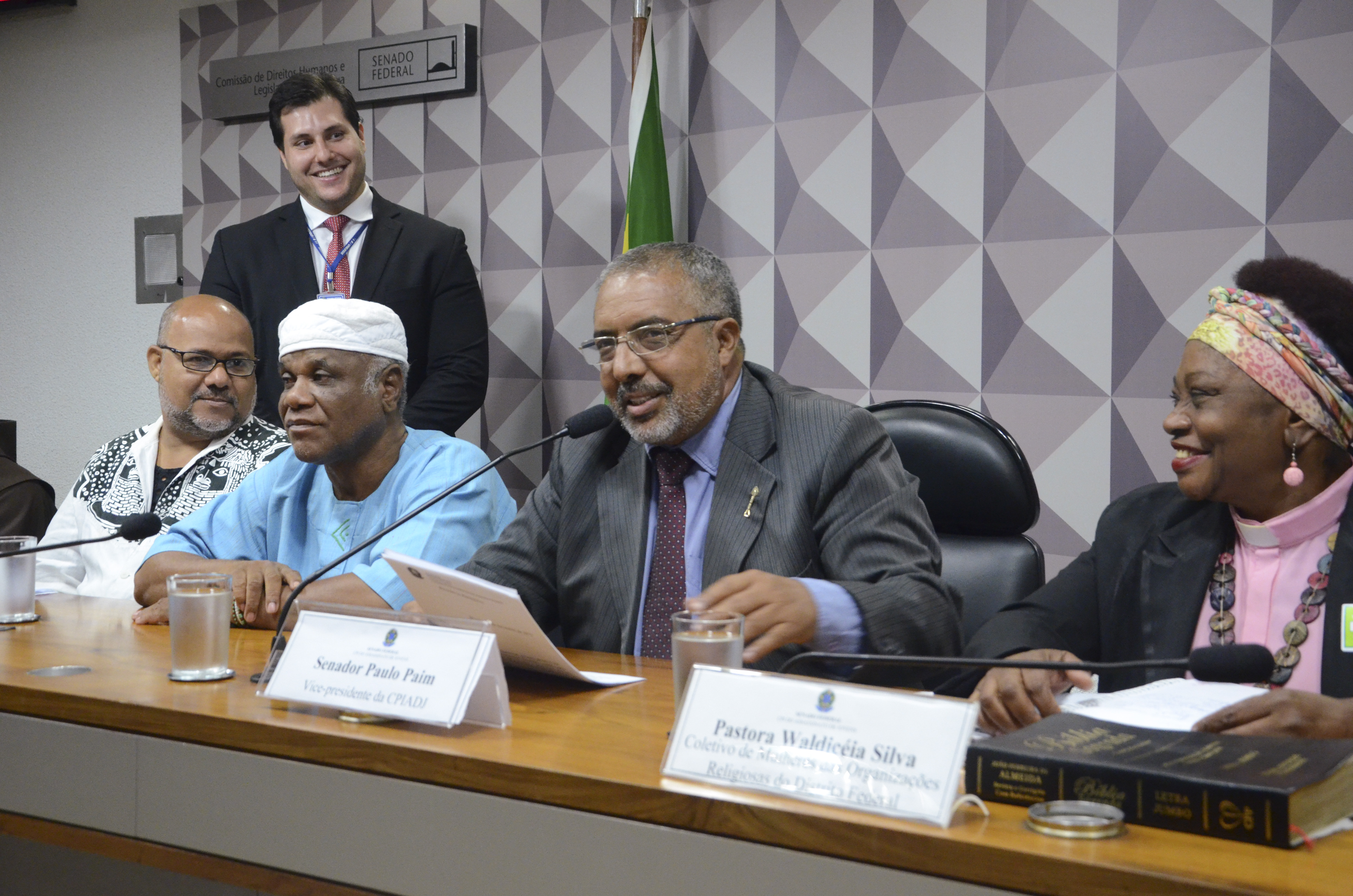 CPI do Assassinato de Jovens realiza audiência pública para debater a violência institucional e o racismo contra a juventude negra. Mesa: ativista do Movimento Negro e representante do Comitê Estadual de Promoção da Igualdade Étnicorracial de Pernambuco, Jorge Bezerra de Arruda; babalawo Ivanir dos Santos - Representante do Centro de Articulação de Populações Marginalizadas, Carlos Alberto Ivanir dos Santos; presidente da Comissão, senador Paulo Paim (PT-RS); ativista do Movimento Negro e Coordenadora do Coletivo de Mulheres das Organizações Religiosas do Distrito Federal, Pastora Waldicéia Silva. Foto: Ana Volpe/Agência Senado